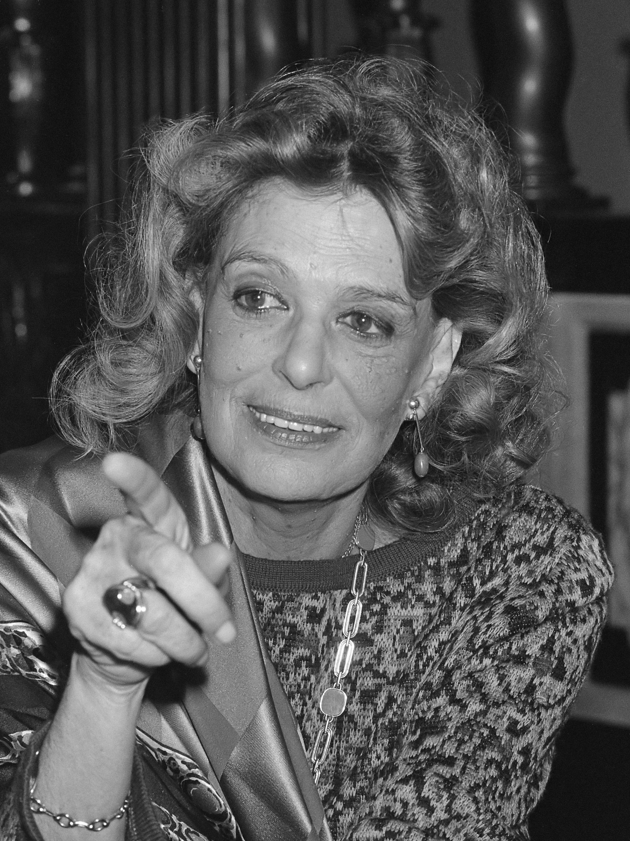 Bezoek van de Griekse minister van Cultuur Melina Mercouri aan de tentoonstelling De Akropolis van Athene in Amsterdam. Melina Mercouri tijdens haar toespraak 21 december 1985